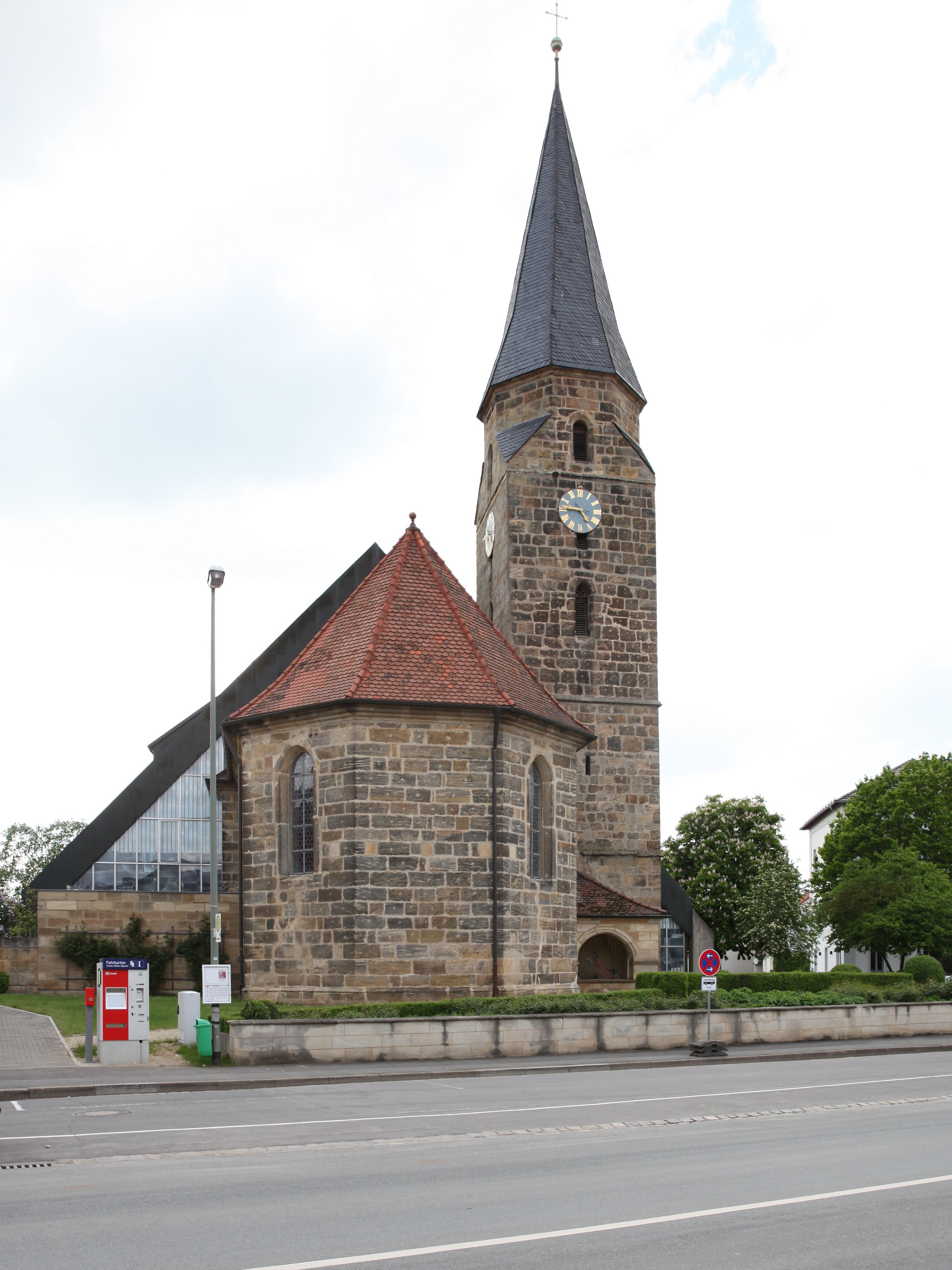 Stadtpfarrkirche St. Leonhard, Breitengüßbach